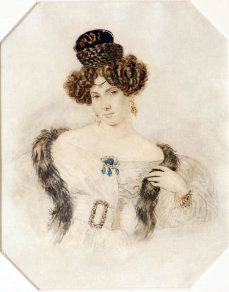 Евдокия Михайловна Бакунина(1793-1882), художница, двоюродная сестра революционера М.А.Бакунина.